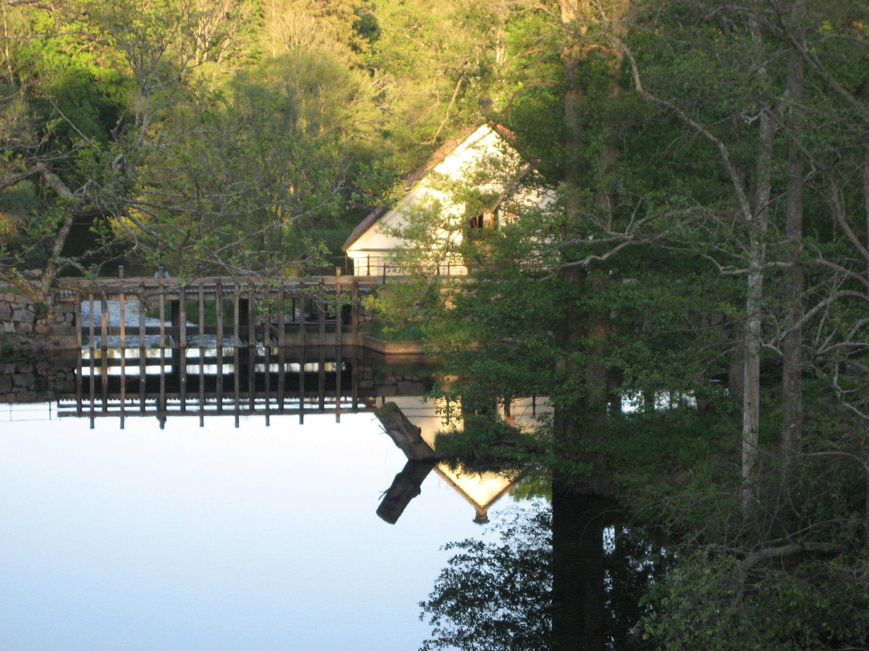 Järle damm och kvarn sedd från uppströms Vårkväll